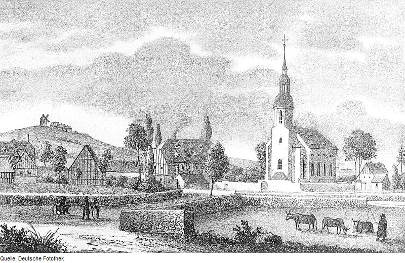 Original image description from the Deutsche Fotothek Eibau. Ortsansicht mit Windmühle auf dem Beckenberg